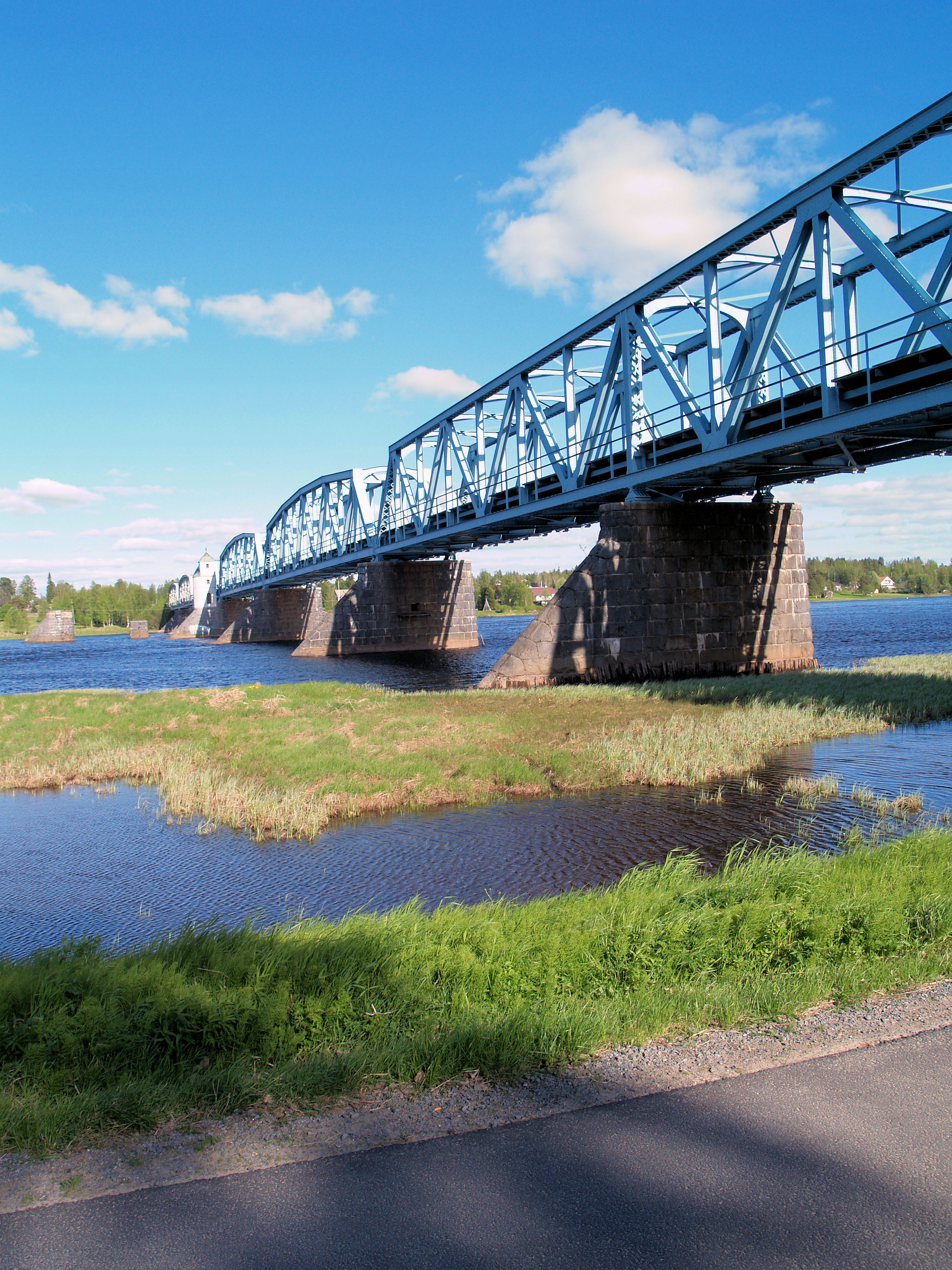 Einenbahnbrücke über den Torne älv. Grenzbrücke zwischen Haparanta und Tornio. Sicht auf die Oberwasserseite der Pfeiler